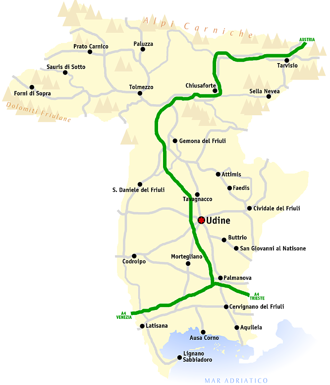 Kaart van de provincie Udine